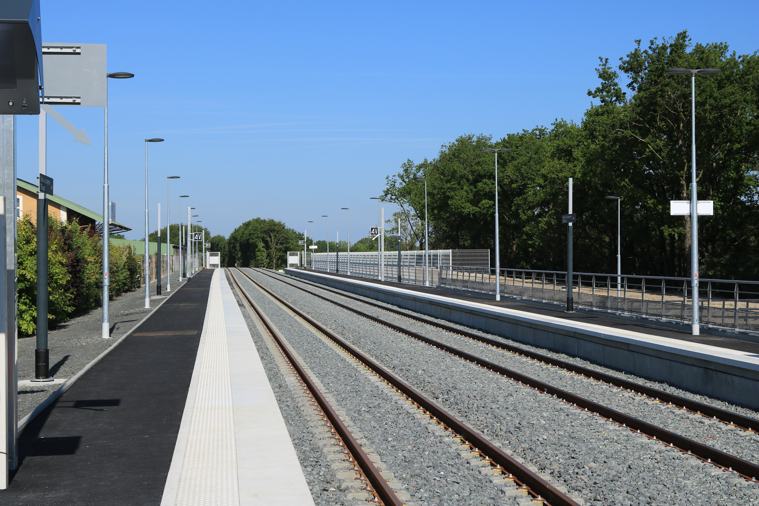 Vue de la nouvelle halte de Torfou en direction de Clisson.